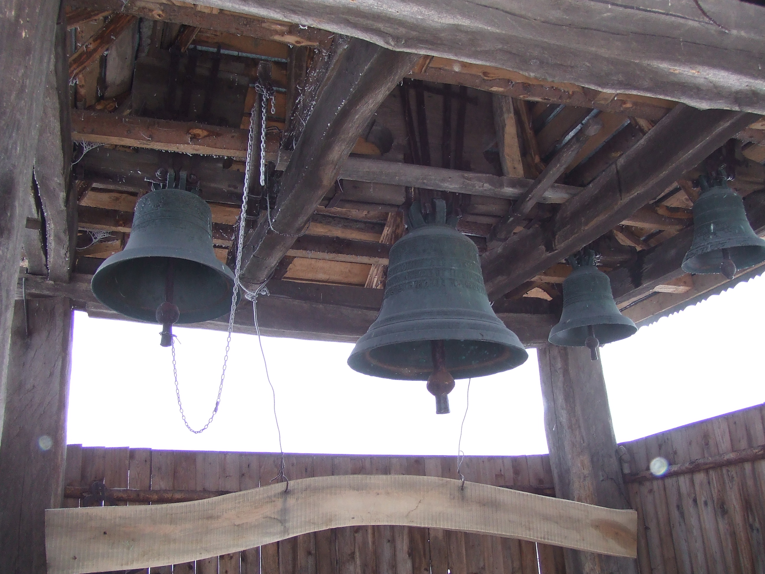 Biserica de lemn din Căpuşneni, Clopotniţa Căpuşneni